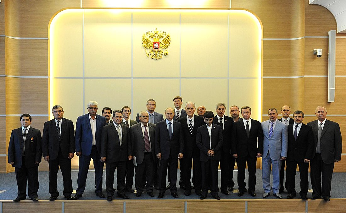 Президент России Владимир Путин с представителями крымско-татарской общины